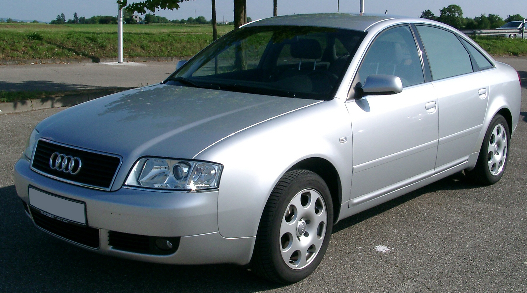 Audi A6 C5